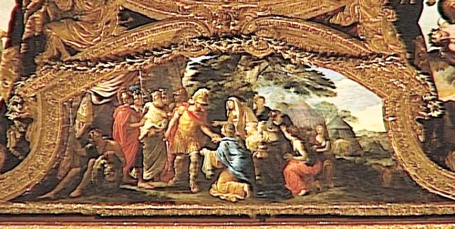 CORIOLAN LEVANT LE SIEGE DE ROME A LA DEMANDE DE SA MERE ; Salon : Salon d’Apollon, Grands appartements du Château de Versailles Emplacement : voussure ; est